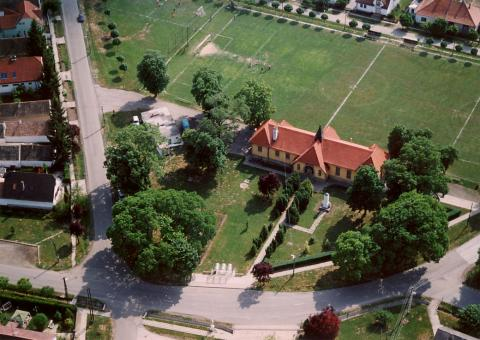 Lánycsók, Hungary, aerialphotography. A Lánycsóki leventeegylet székháza az 1925-26-ban épült Népház volt, jeleleg művelődési házként funkcionáló építmény. (wiki)